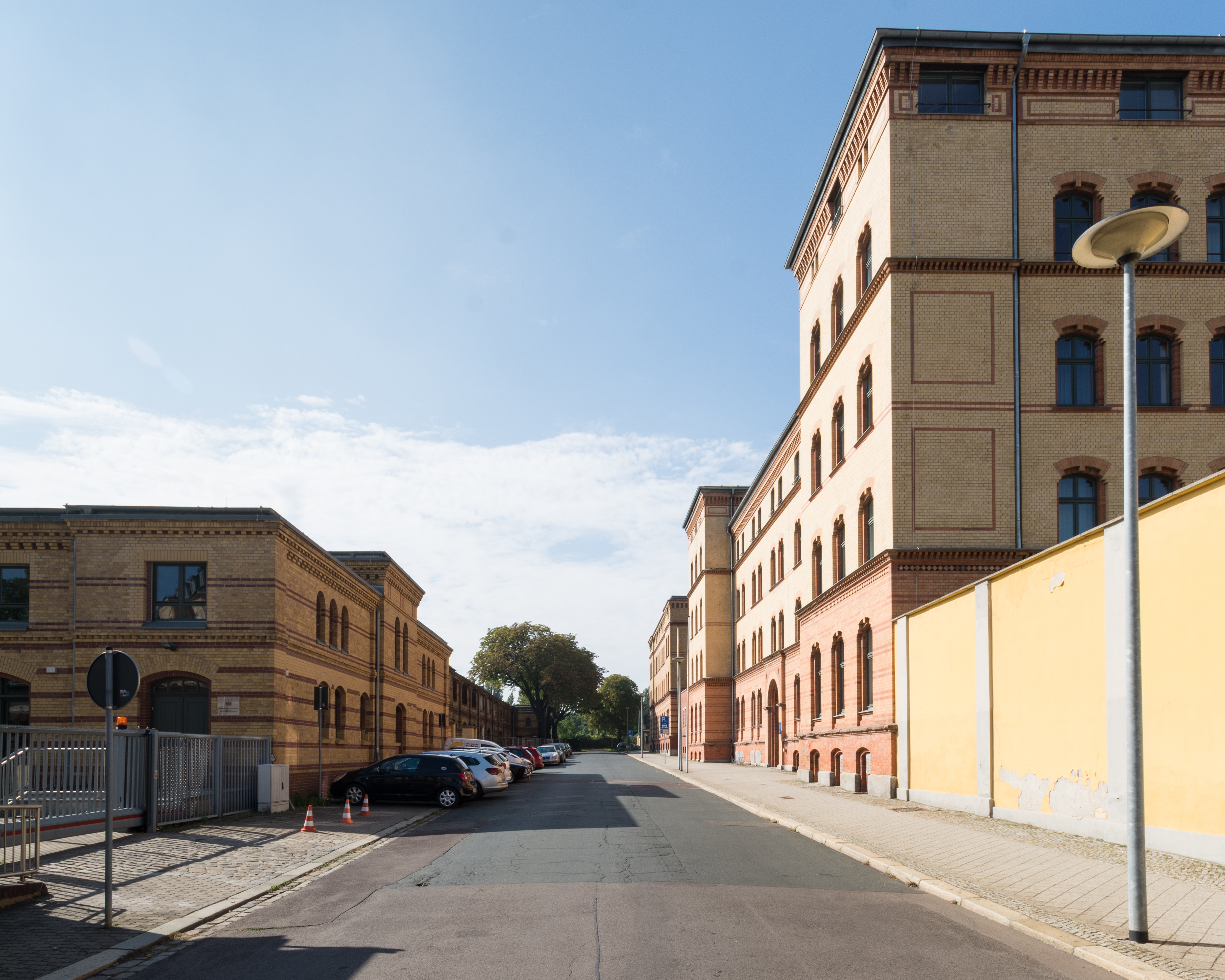 Straßenzug Am Buckauer Tor in Magdeburg-Altstadt. This is a photograph of an architectural monument.It is on the list of cultural monuments of Magdeburg